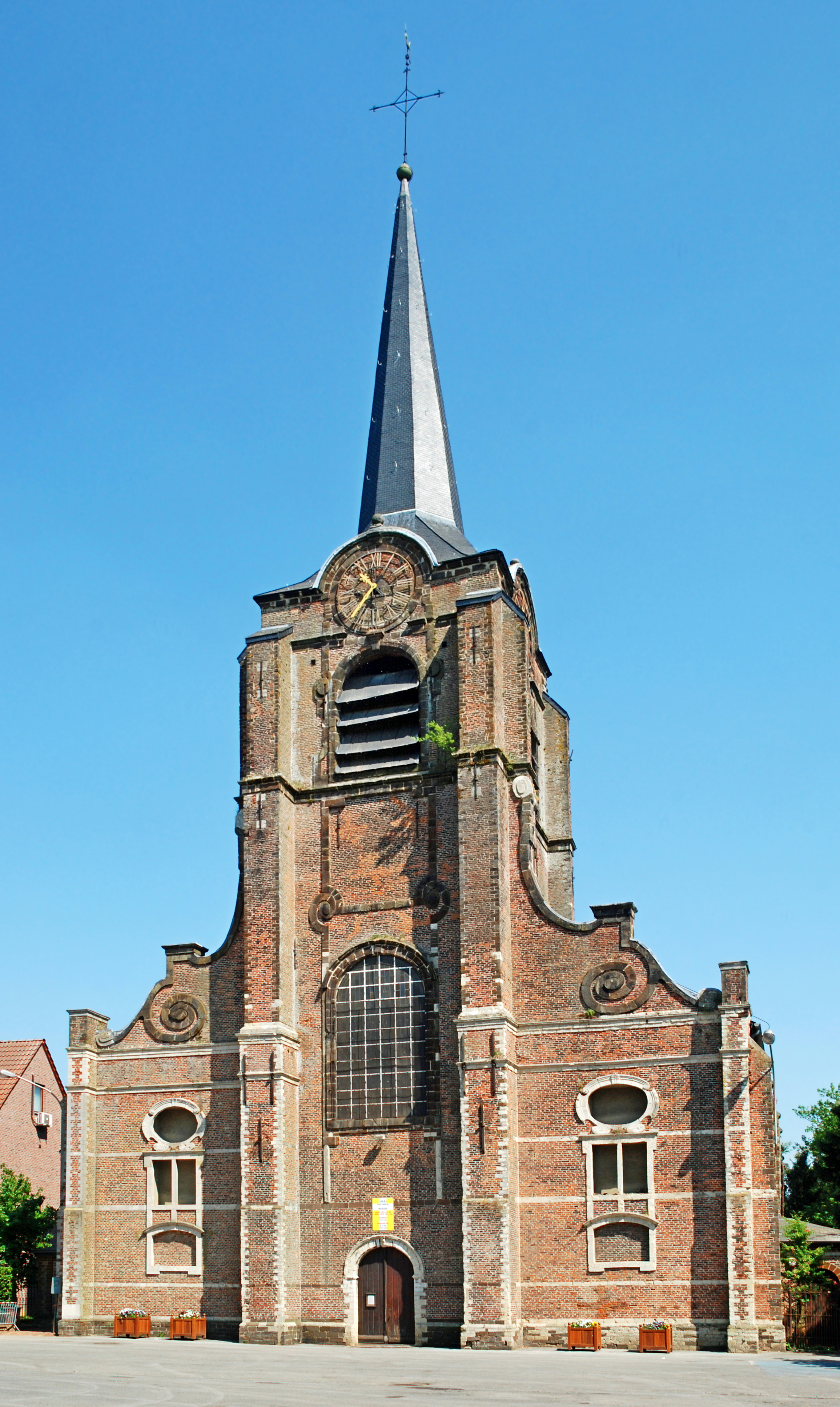 Belgique - Wavre - Église Saint-Martin de Limal